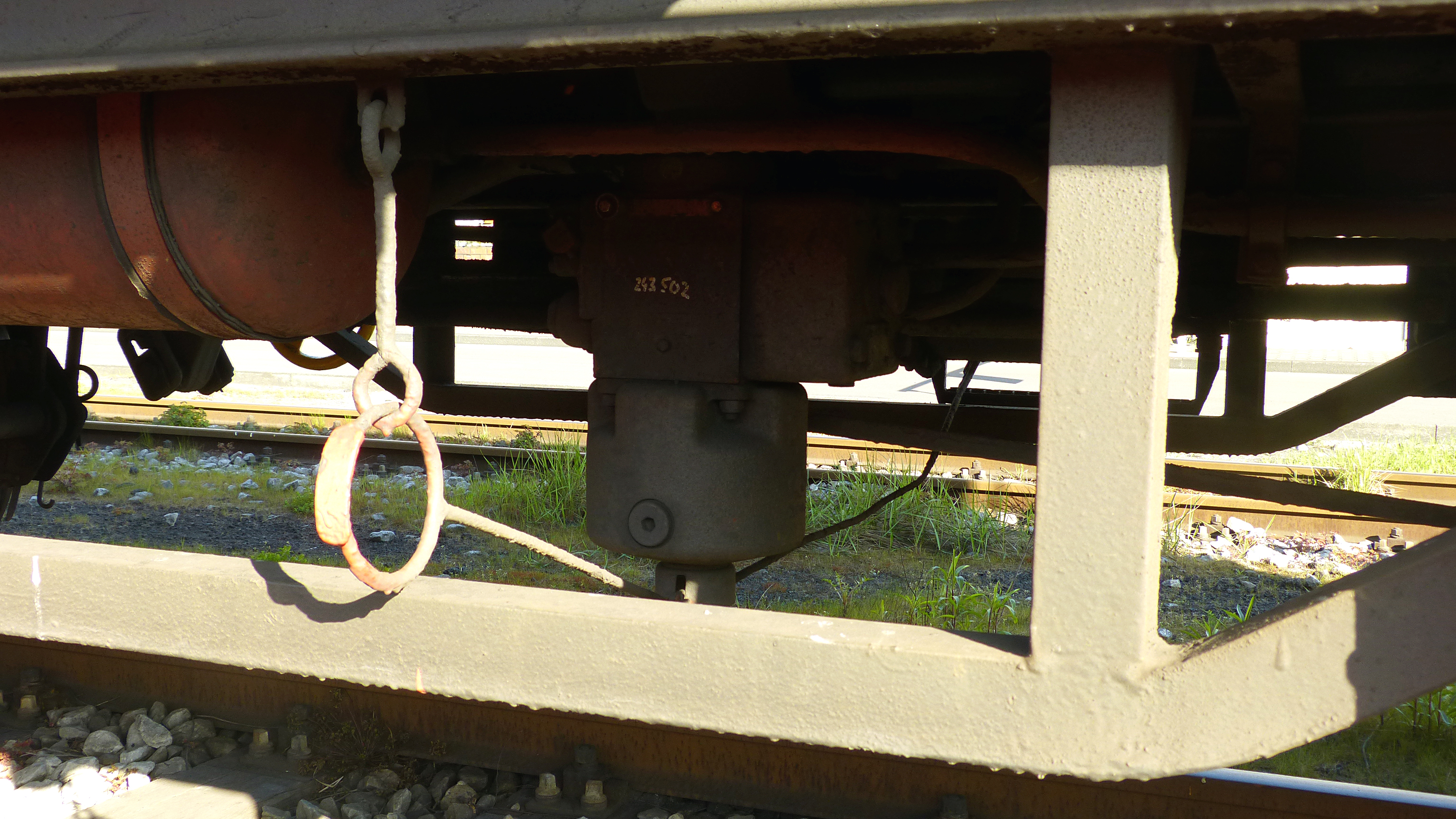 Steuerventil von Knorr-Bremse eines Güterwagens. Links der Vorratslufbehälter (abgeschnitten). Vom Steuerventil ausgehend der Lösezug mit rotem Griff.